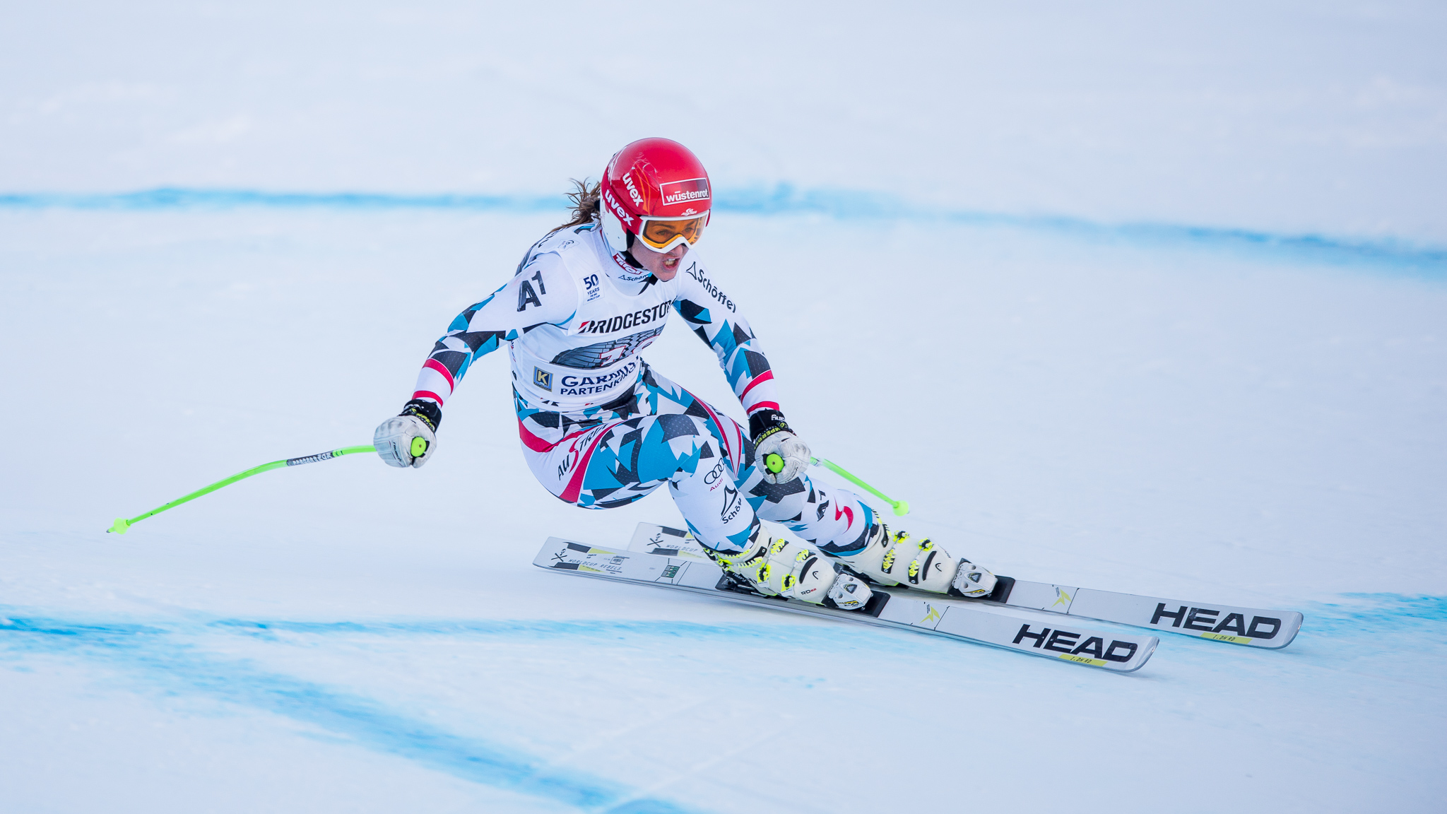 64. Kandahar Rennen,Audi FIS Ski Weltcup Garmisch-Partenkirchen,Damen Abfahrt,Elisabeth Görgl,Kandahar,Ladies Downhill